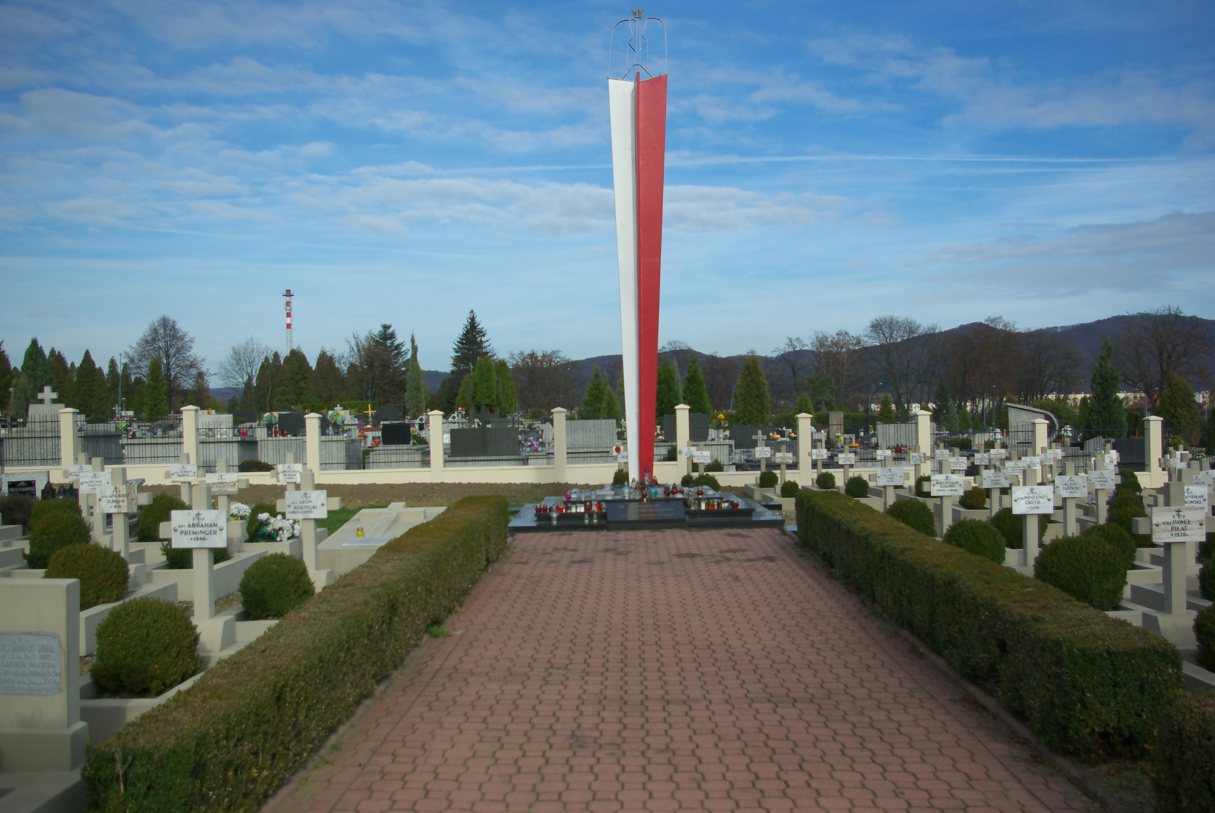 Kwatera żołnierzy polskich na Cmentarzu Centralnym w Sanoku, poległych w walkach o wyzwolenie Ojczyzny w latach 1918-1948.